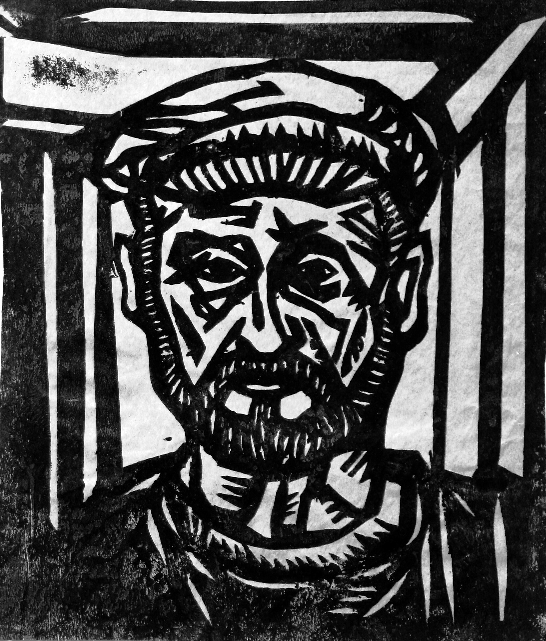 פורטרט עצמי בשחור לבן